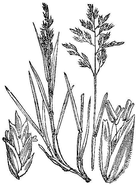 Slika 322. Jednoletna látovka. (Póa ánnua.)